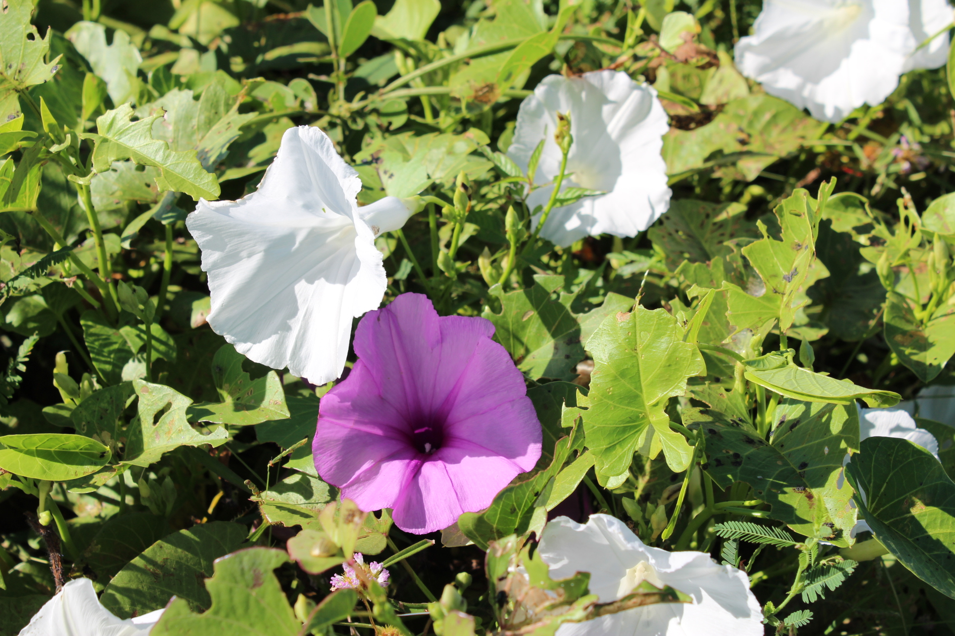 Salsas, rosa e branca, nas floradas de maio no Piauí.